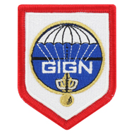 Insigne du GIGN